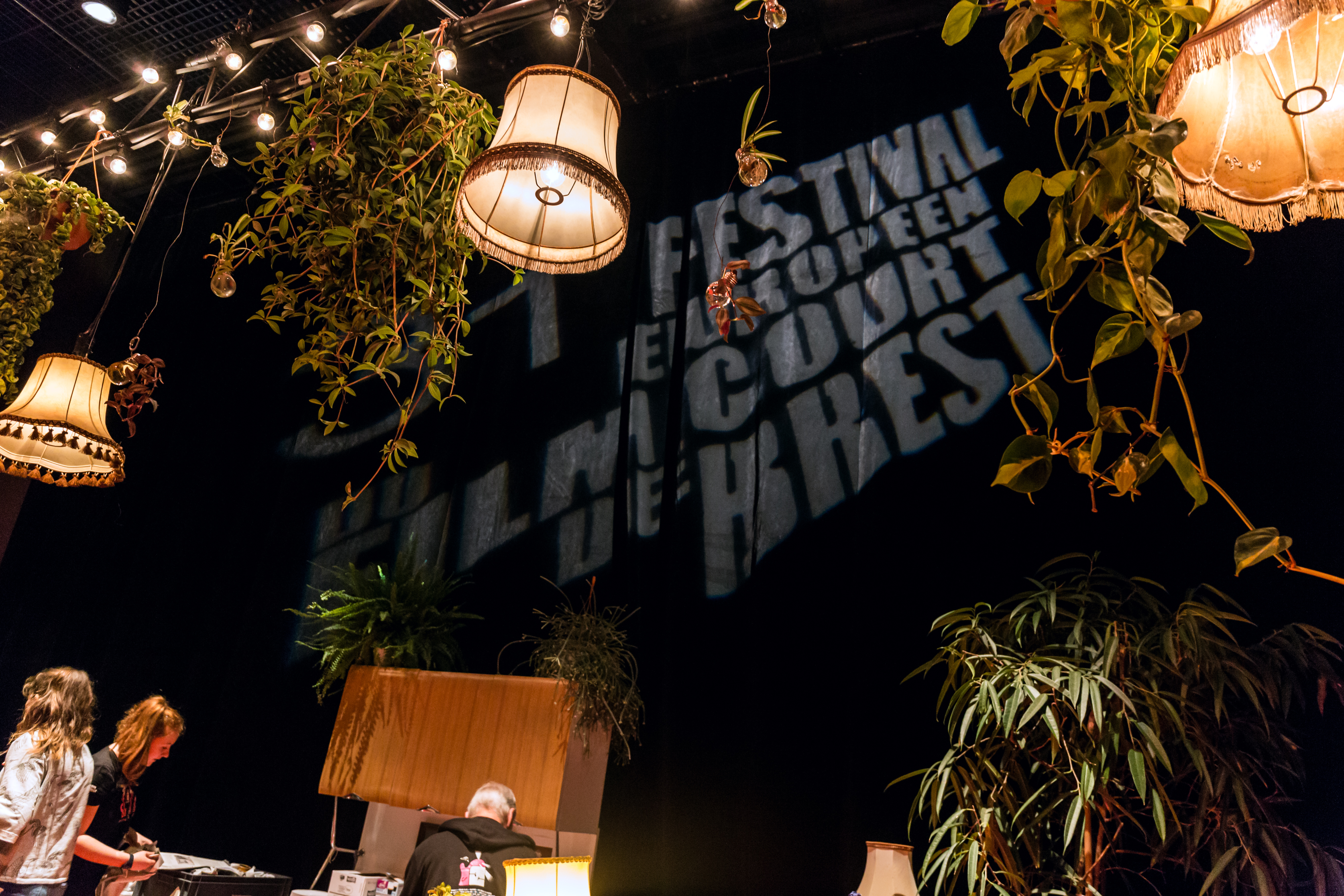 Méridienne du Festival européen du film court de Brest lors de la Template:31e édition en novembre 2016 dans Le Quartz.